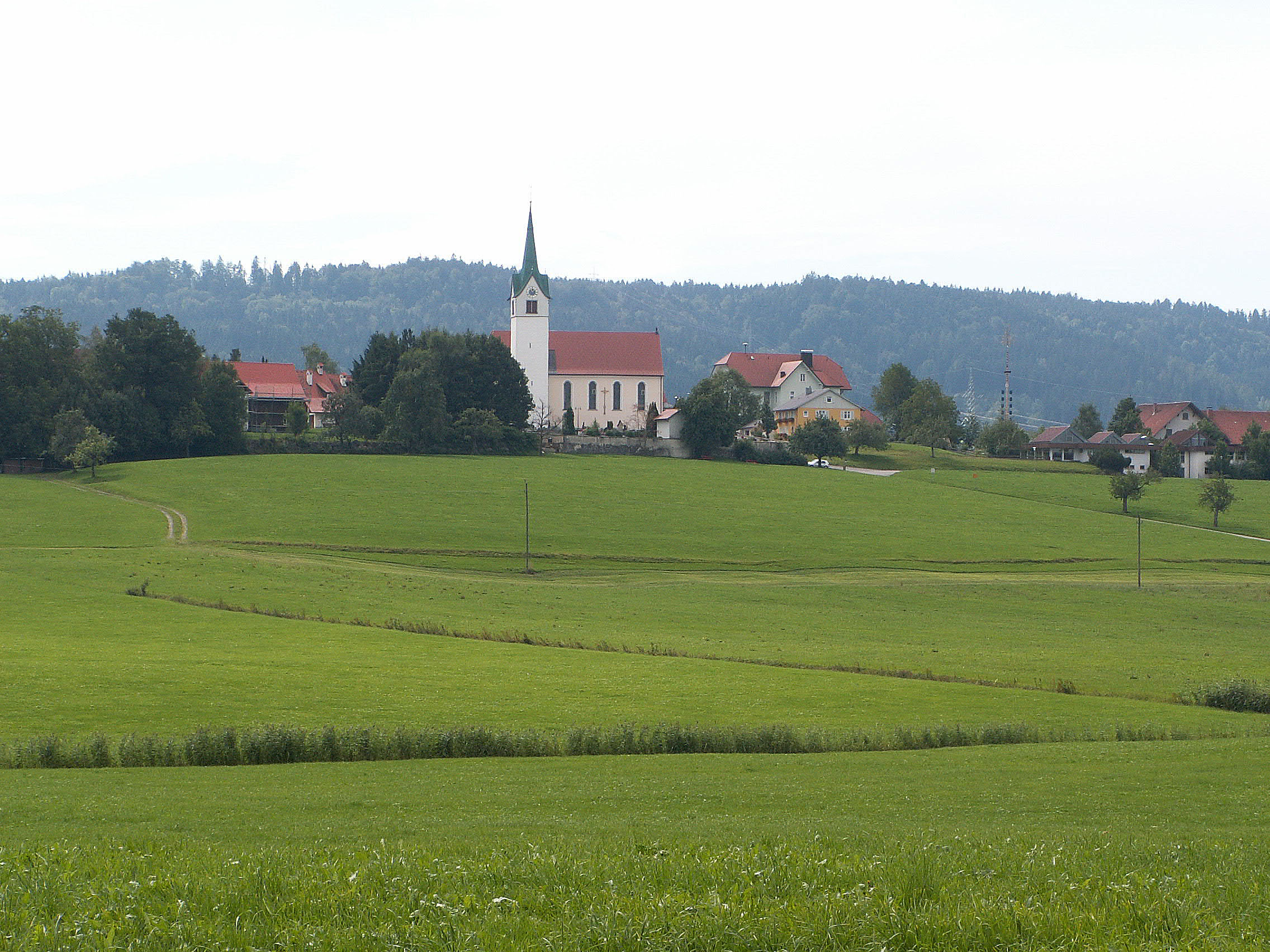 Opfenbach